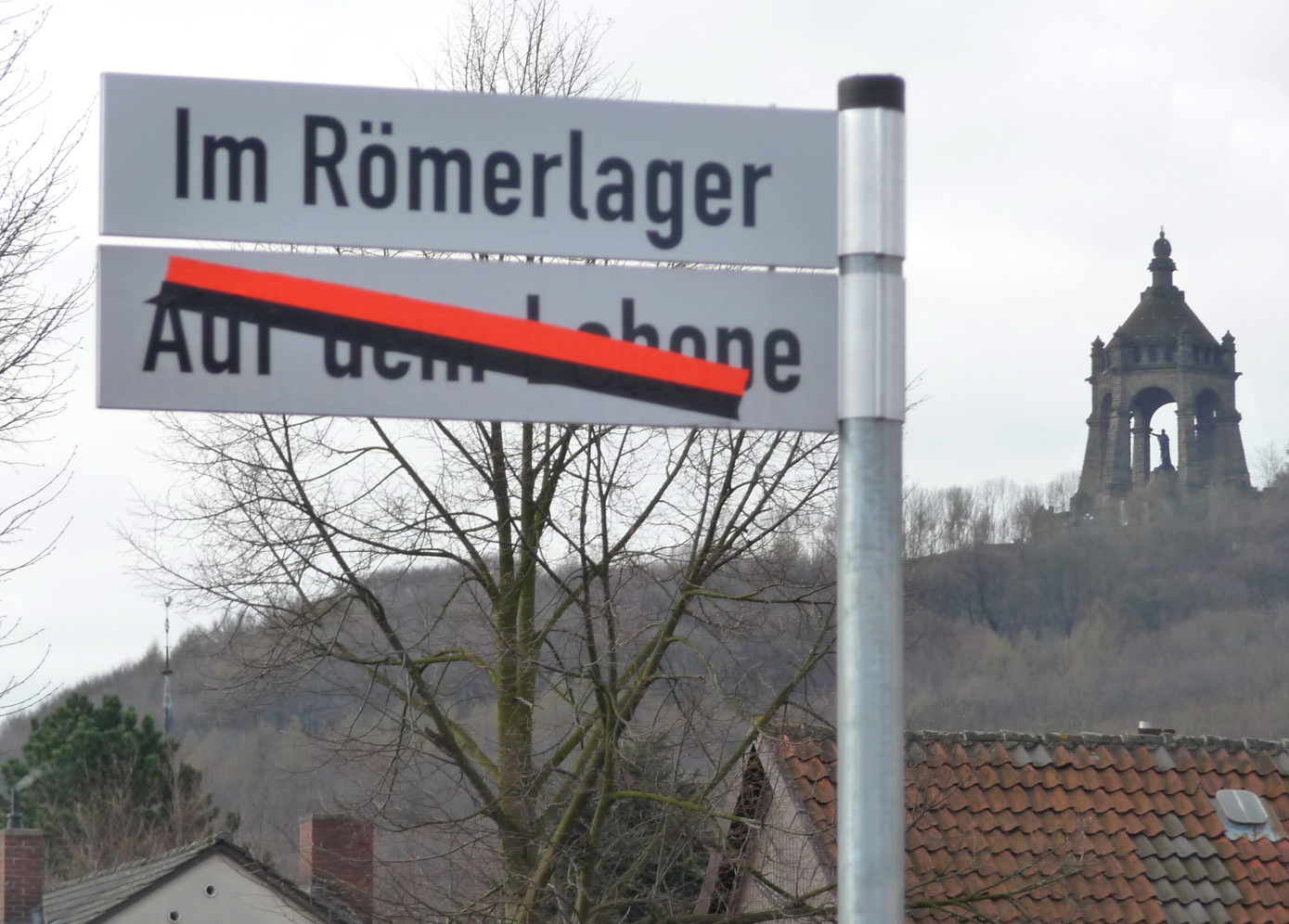 Straßenumbenennung am Ausgrabungsareal des Römerlagers Porta Westfalica